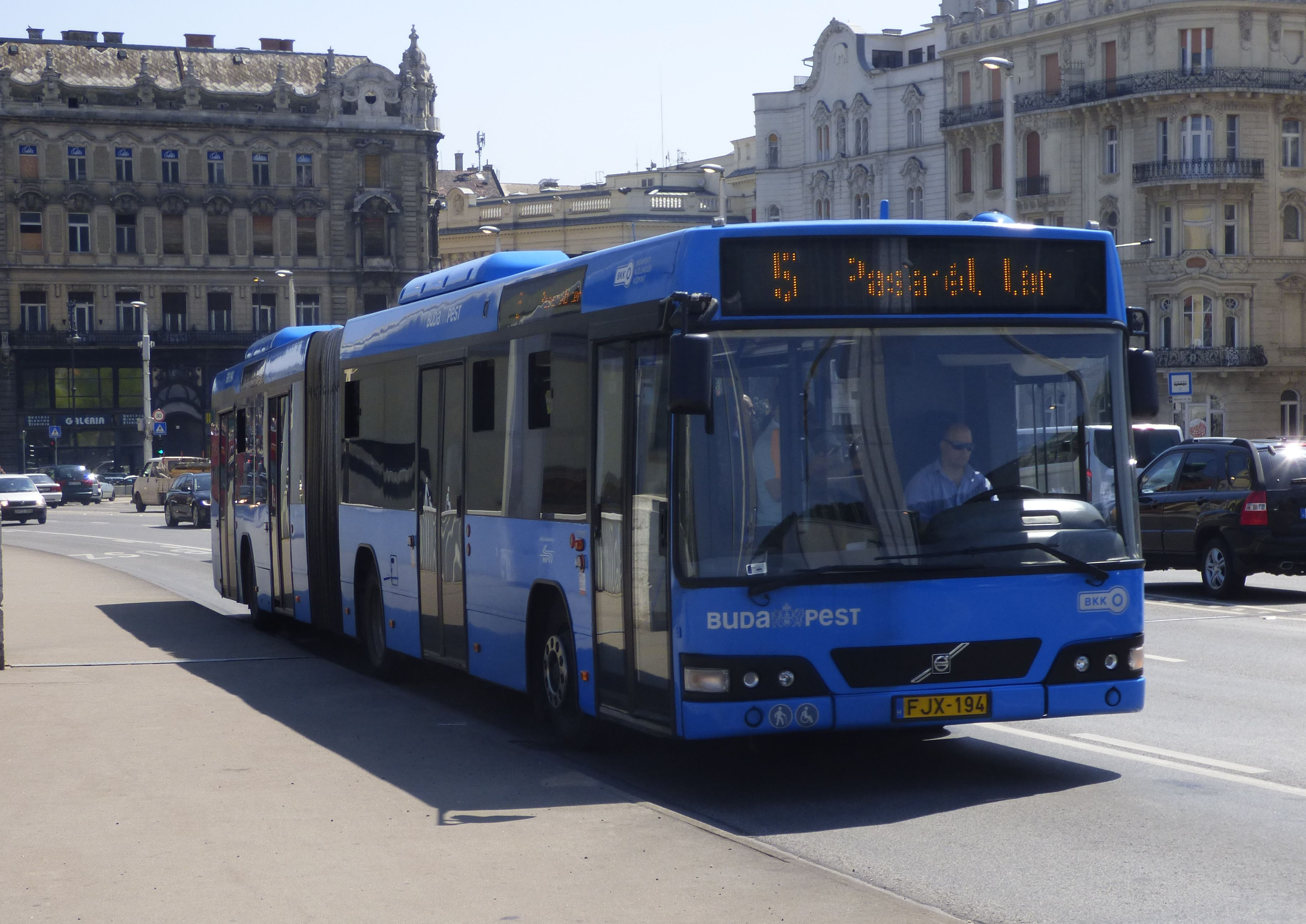 Volvo 7700A busz az 5-ös vonalon (frsz. FJX-194)